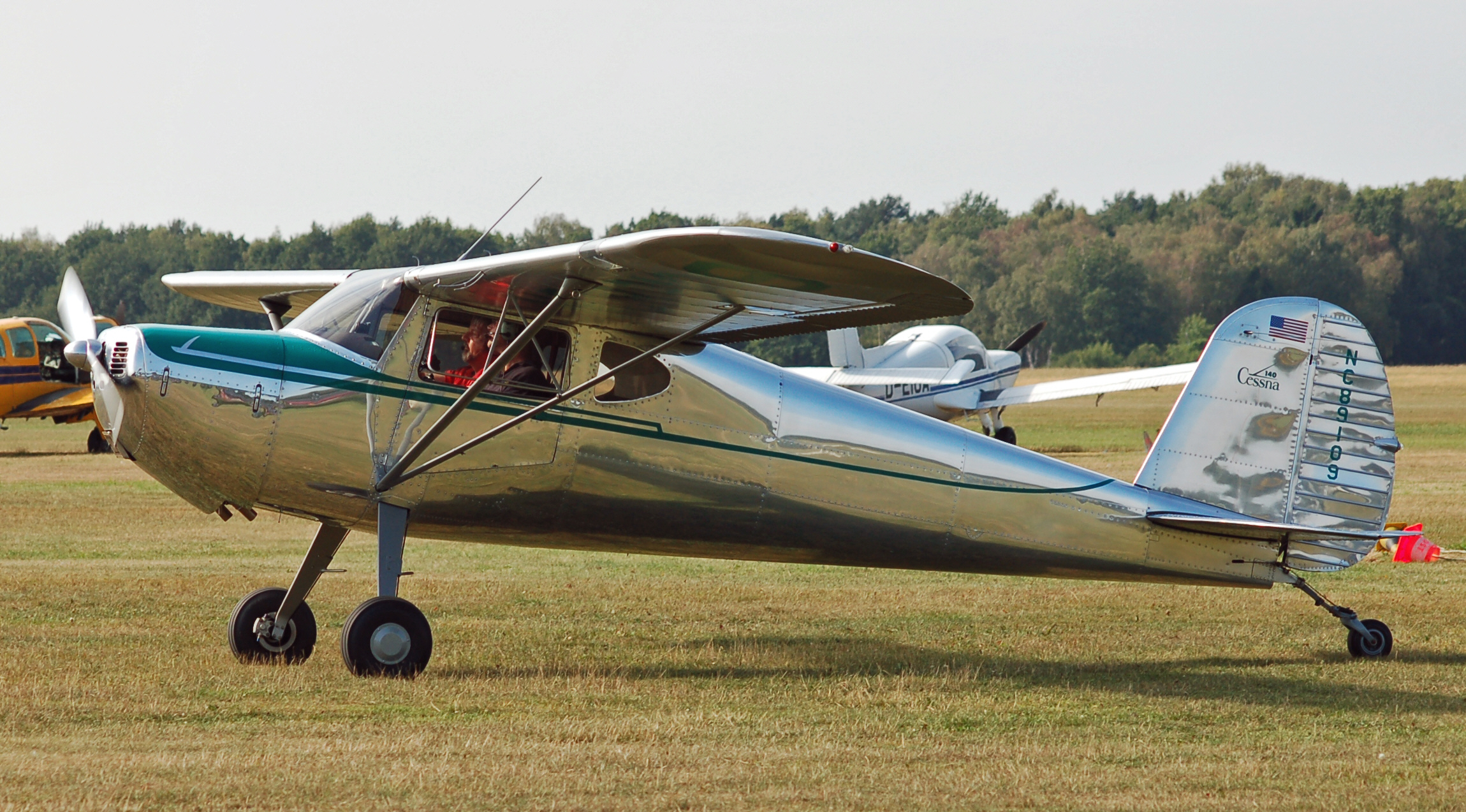 Cessna 140 (NC89109) auf dem Flugplatz Uetersen